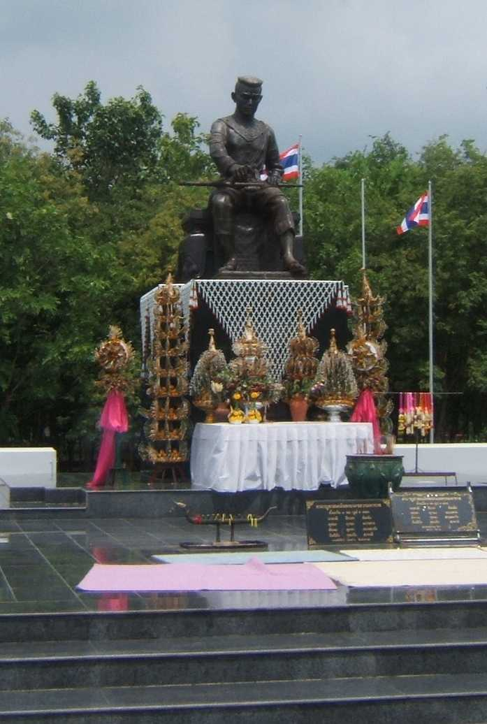 Denkmal für König Naresuan auf dem Gelände der Naresuan Universität, Phitsanulok, Thailand